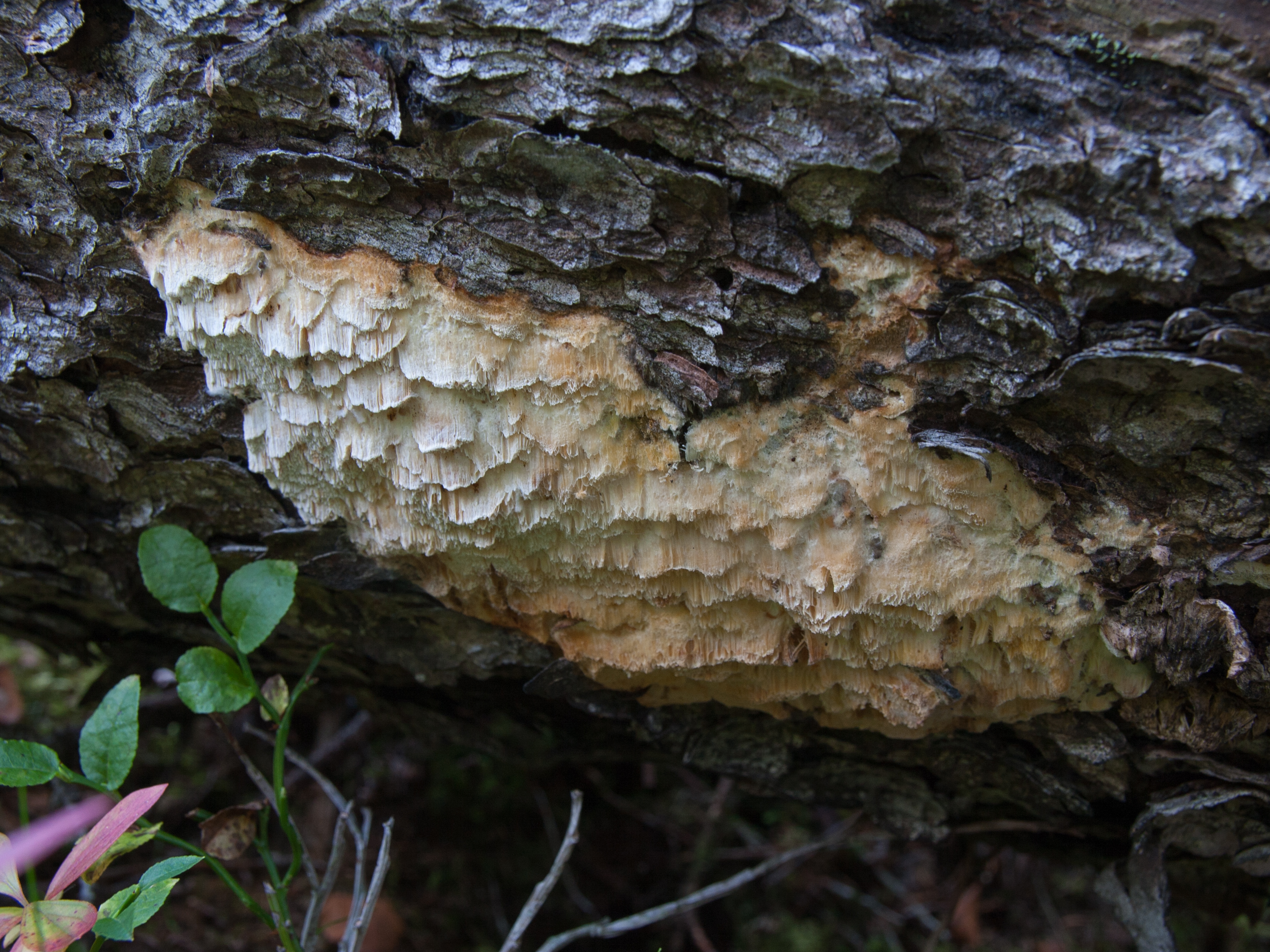 Ostticka